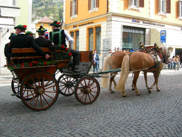 Haflinger vor einer Kutsche in Meran